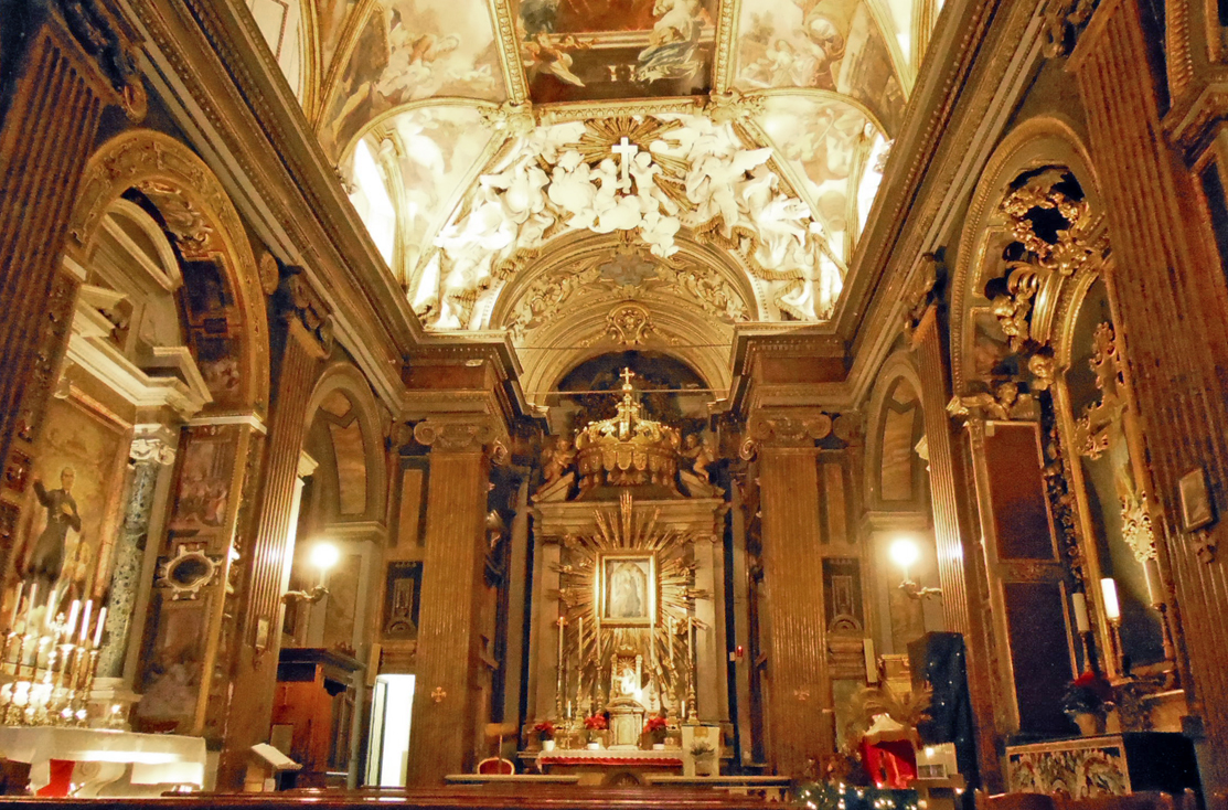 Roma, chiesa di Santa Maria in Trivio, interno